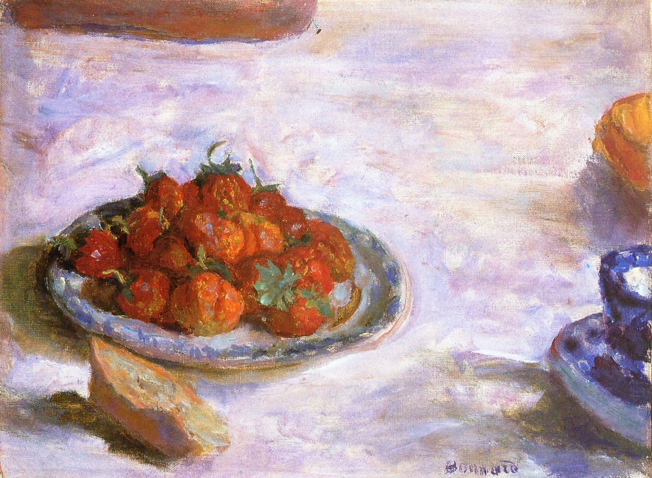 Une assiette de fraises, huile sur toile, 29 cm x 39 cm, nature morte.